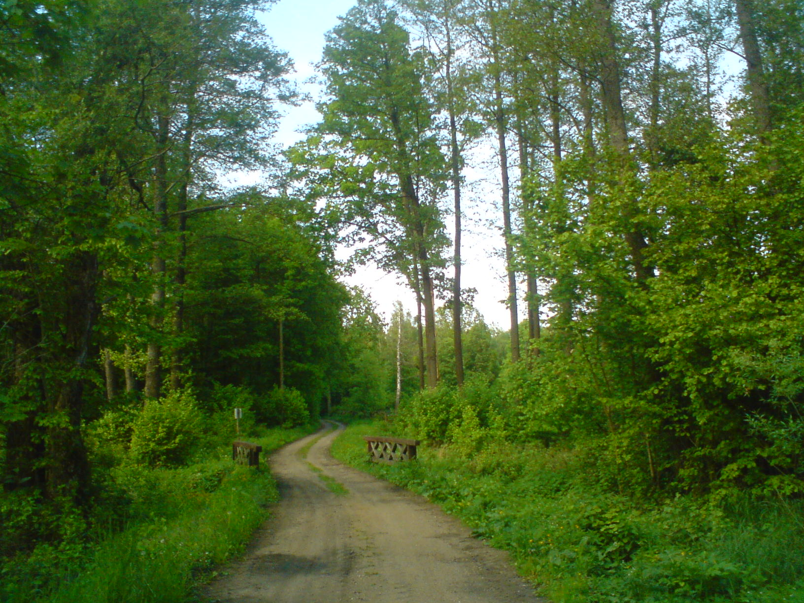 Las okolice Sacharewa